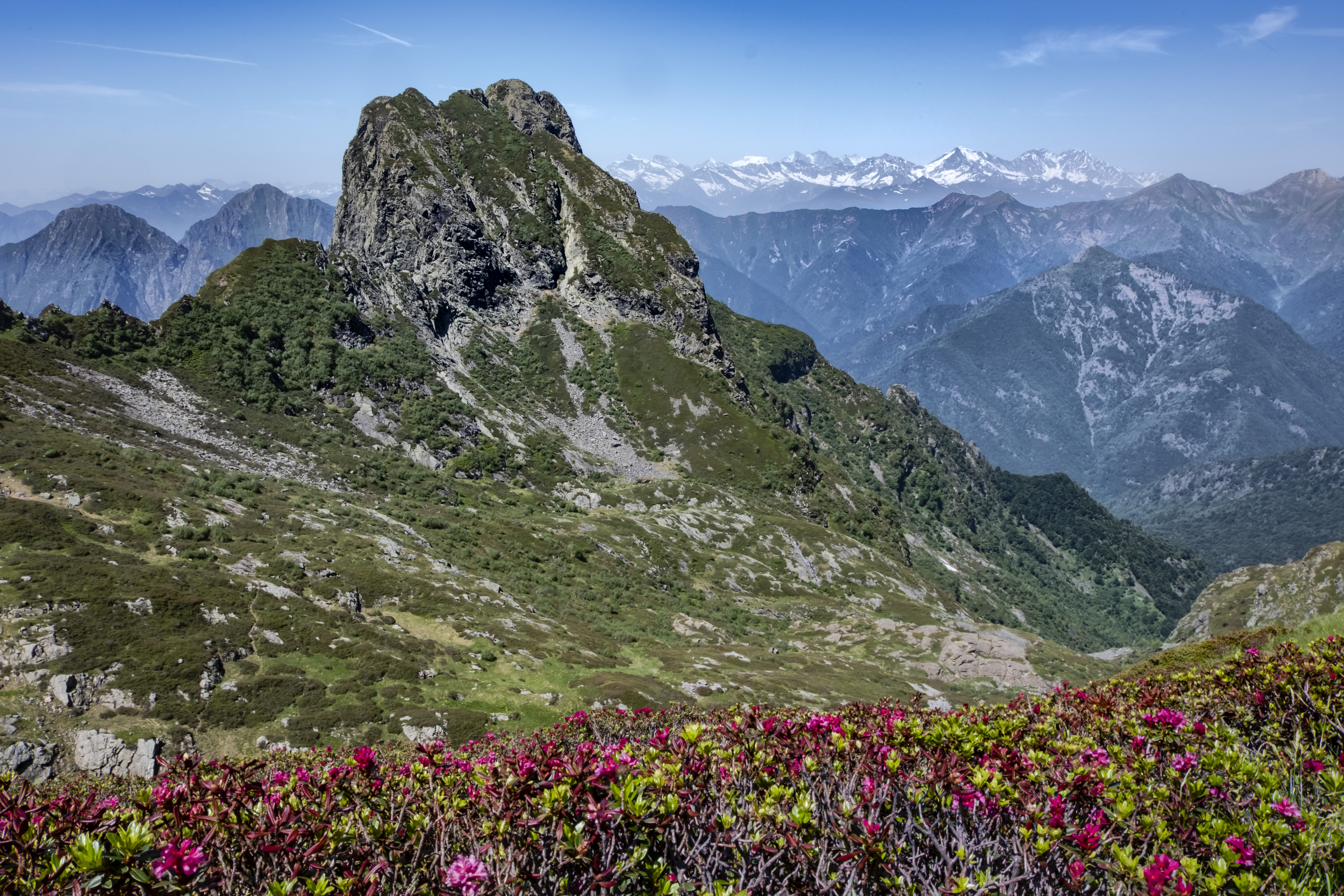 parco nazionale della Val Grande (Q358729)